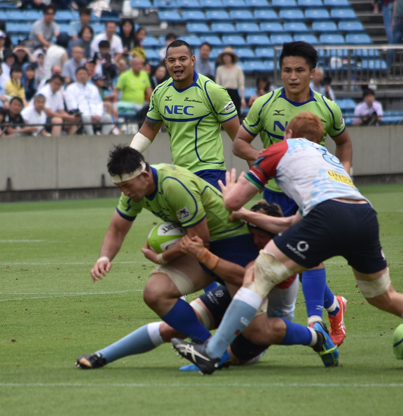 細田 佳也